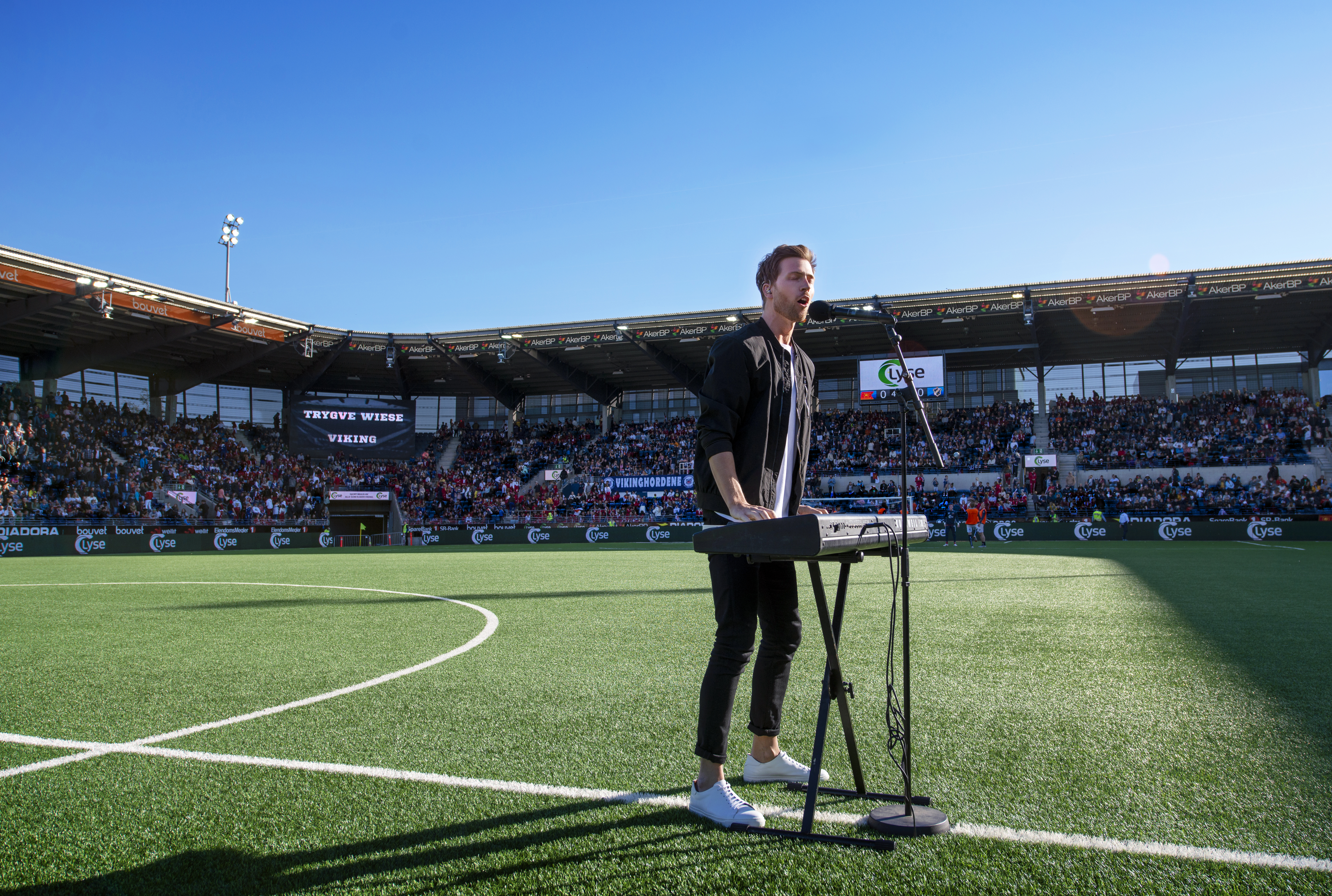 Trygve Wiese in front of 15,000 at Viking Stadion 2019